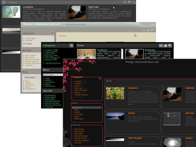 screens-Piwigo